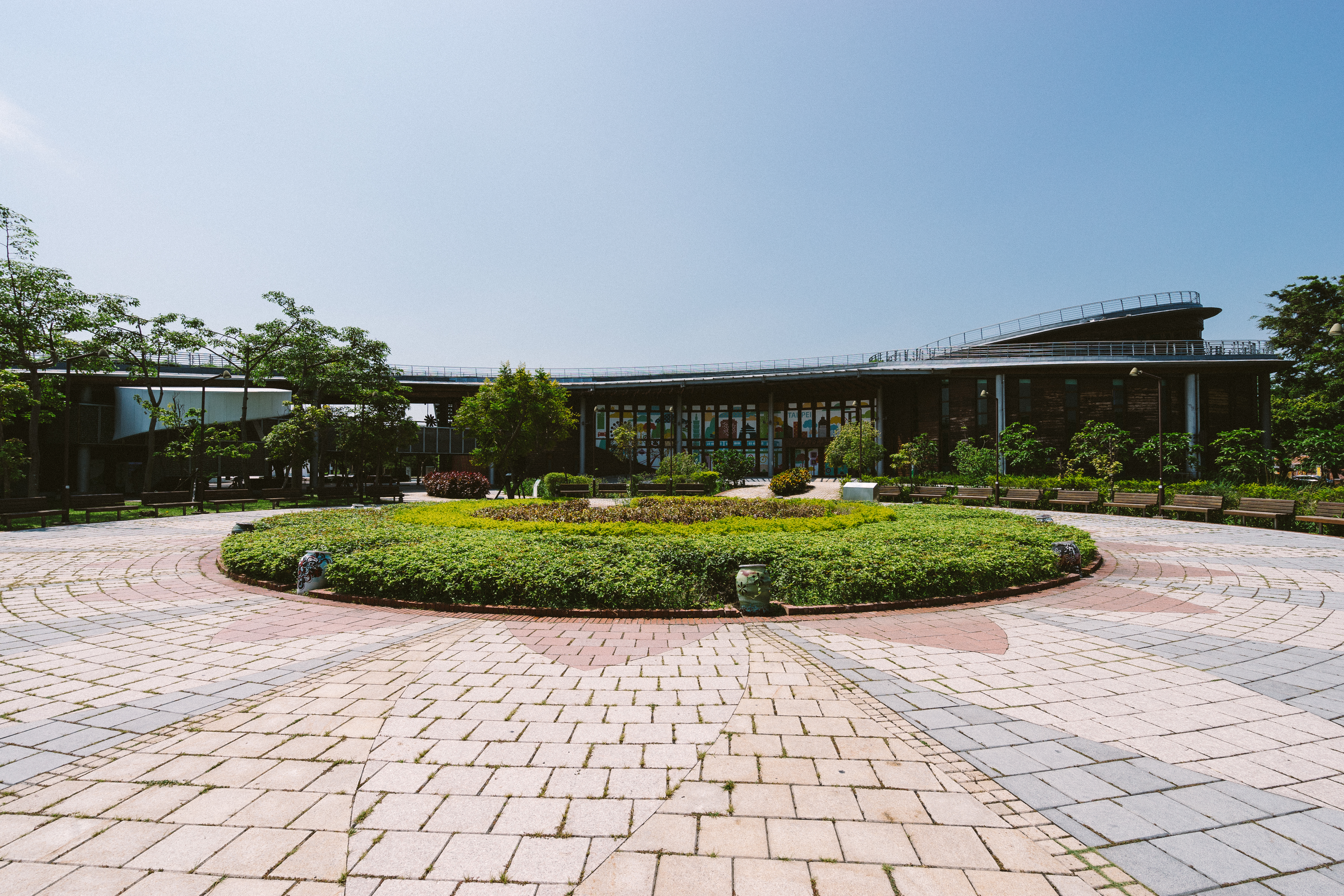 Xinsheng Park